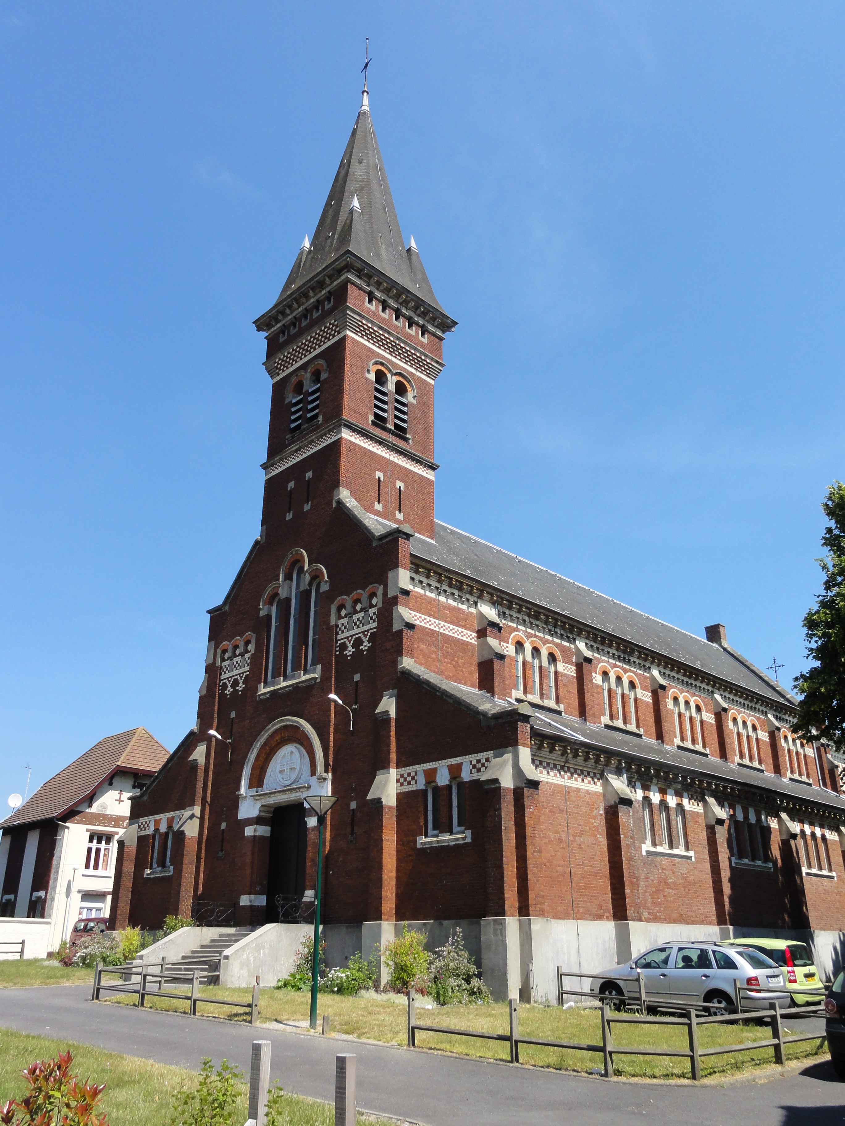 Église Saint-Édouard des cités de la Fosse n° 12 de la Compagnie des mines de Lens, Lens, Pas-de-Calais, Nord-Pas-de-Calais, France. .